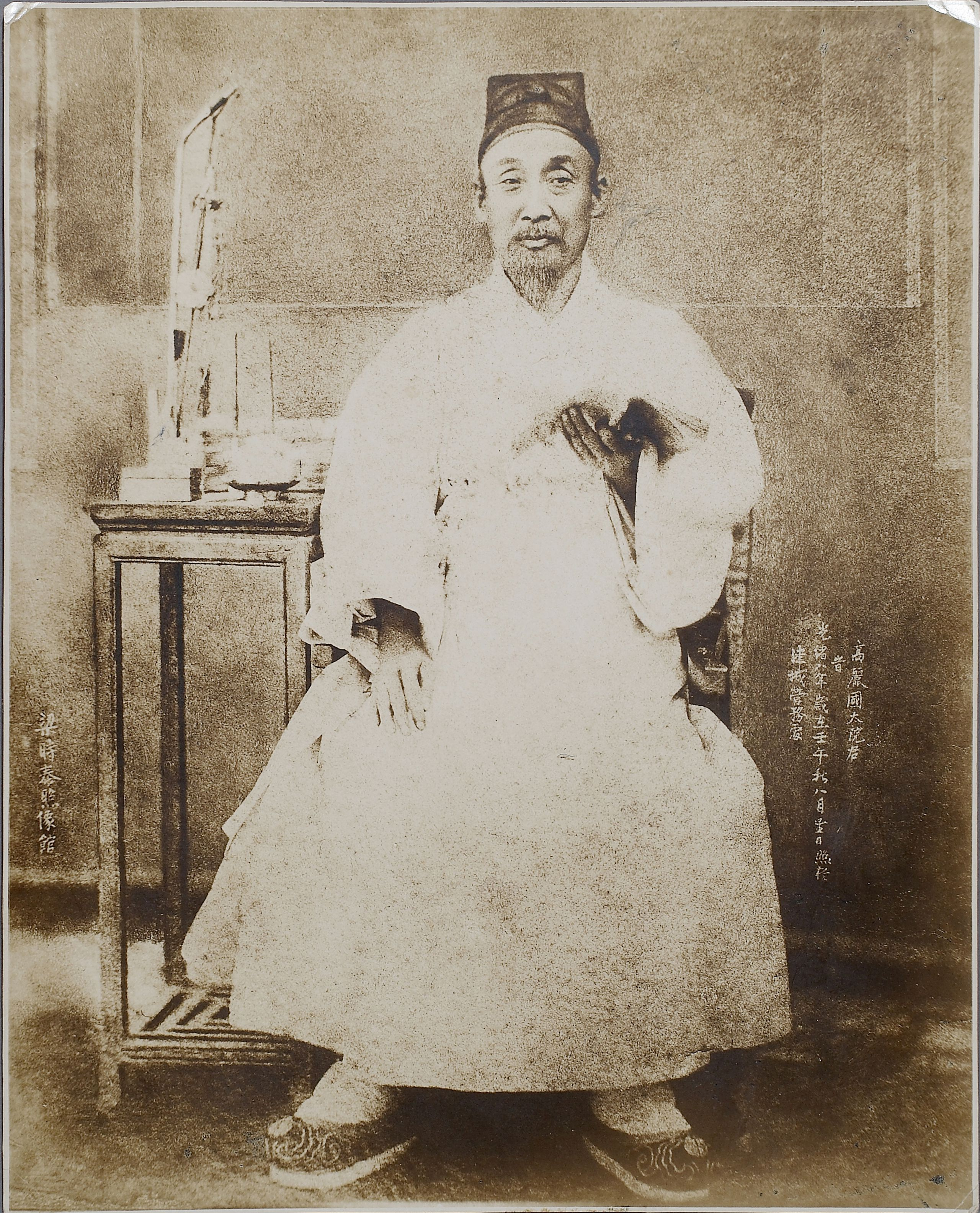 興宣大院君の写真。1883年直隷省保定府より。